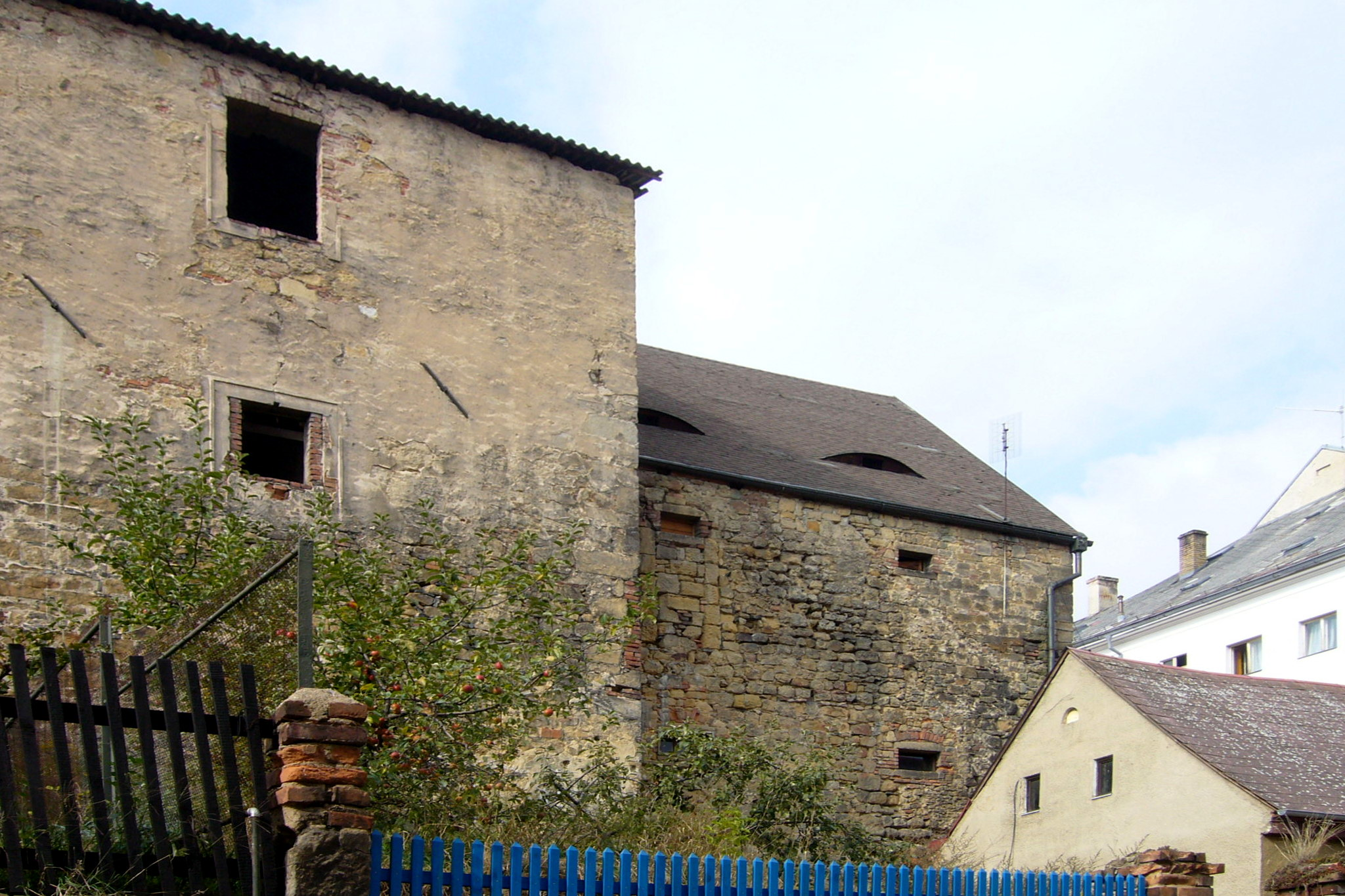 Palác s přístavbou na východě, Hrad Úštěk, Panský dvůr 3 a 86, Úštěk.